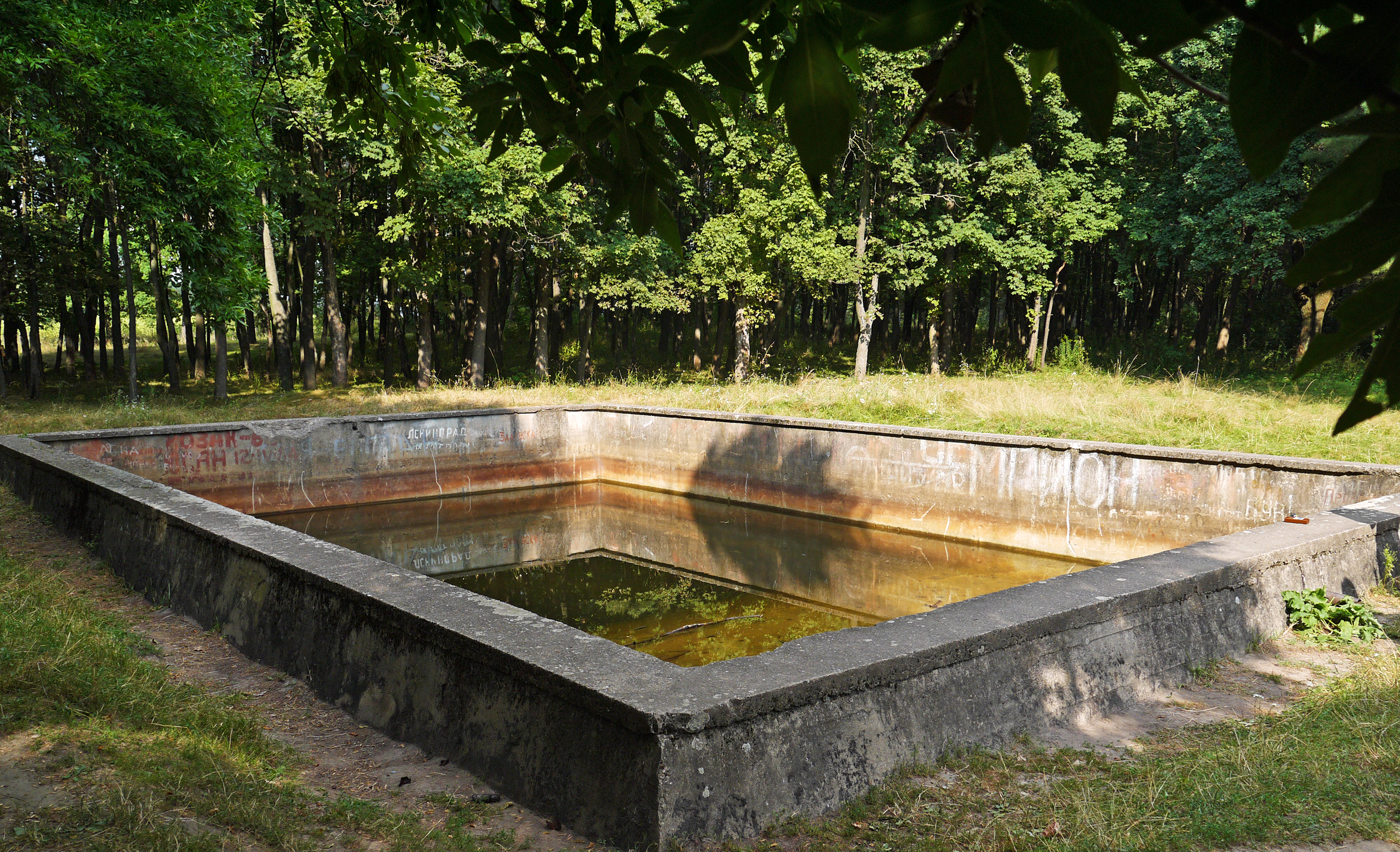 Залишки ставки Гітлера „Вервольф”, Стрижавка, 0,5 км від траси Вінниця - Київ